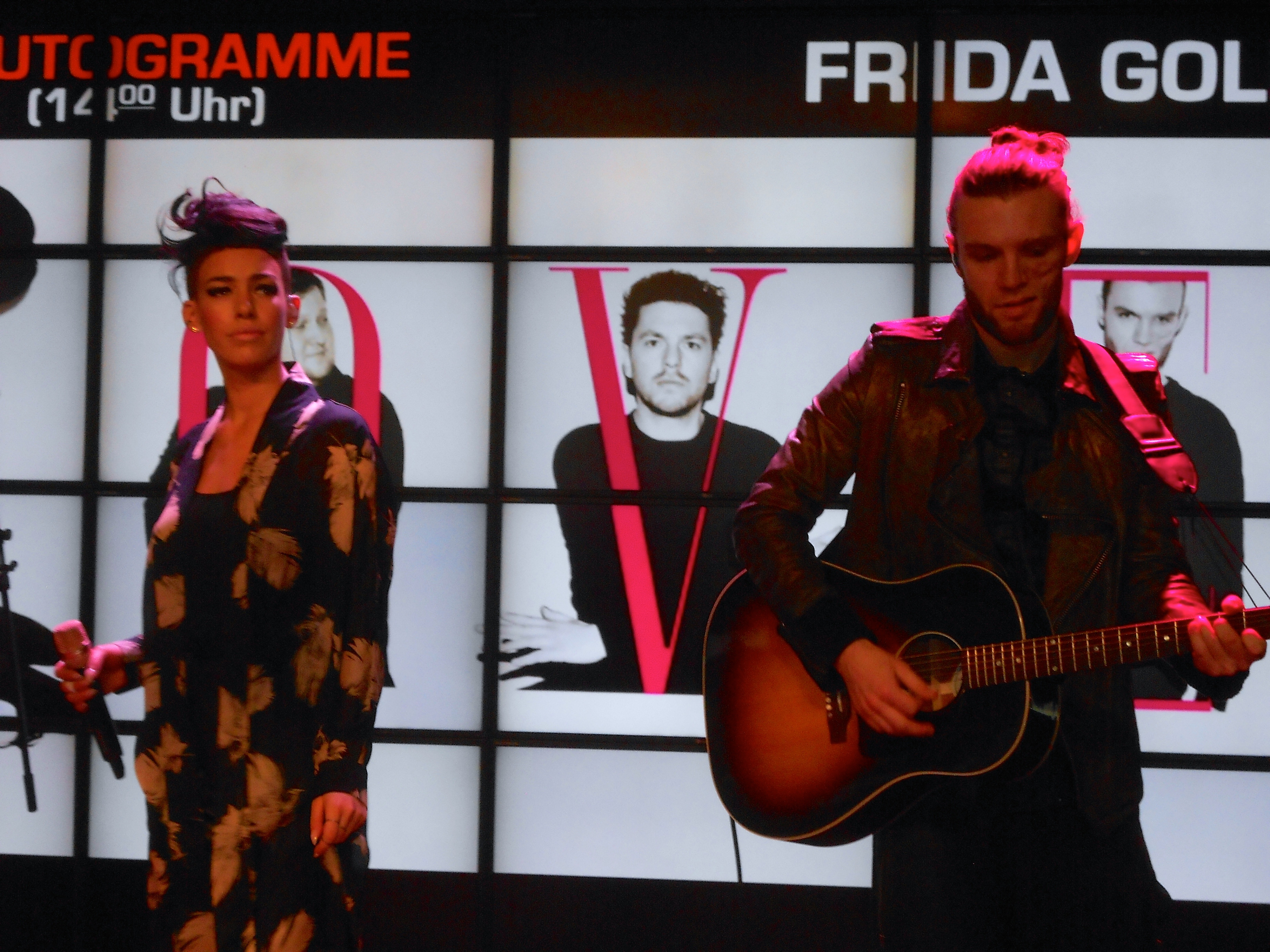 Frida Gold während einer Autogrammstunde im Saturn in Hamburg